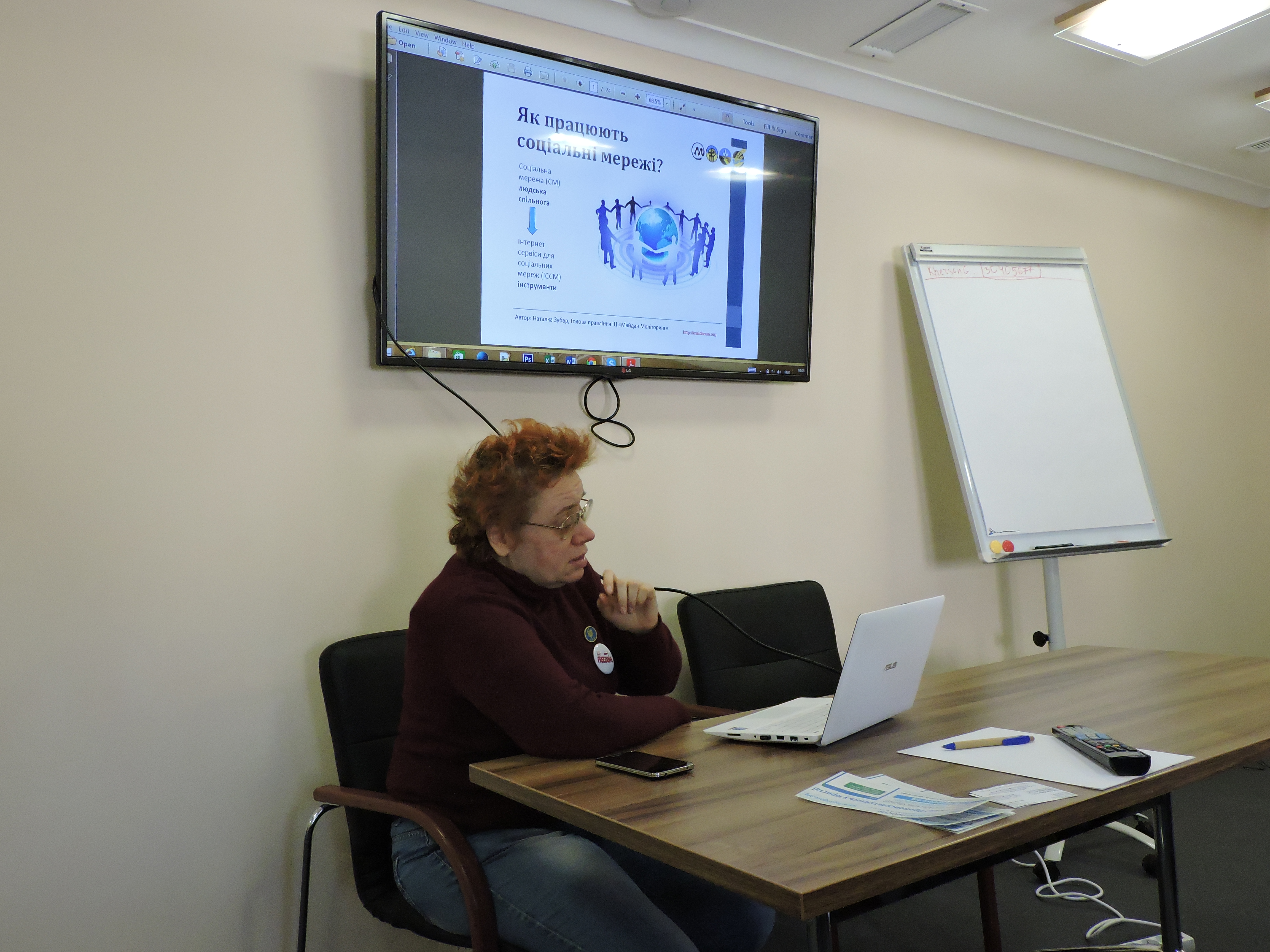 Наталія Зубар під час тренінгу в рамках «Школи інформаційної безпеки», яка реалізована Інформаційним Центром «Майдан Моніторинг»м. Херсон, 13 лютого 2015 року.